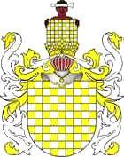 Herb Wczele Clan